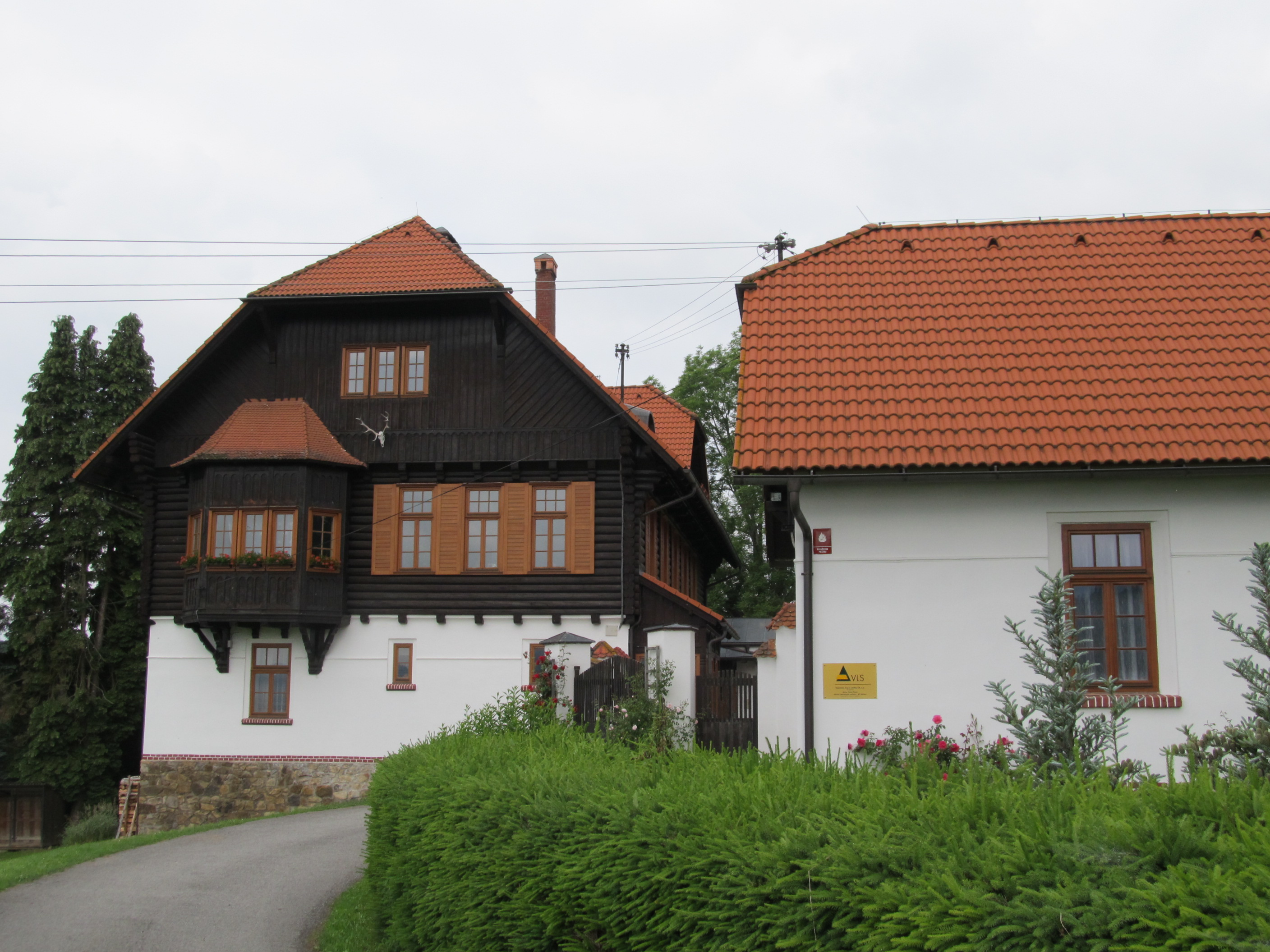 Záhvozdí - středisko Vojenských lesů a statků